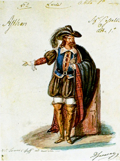 Figurino per il personaggio di Enrico nella Lucia di Lammermoor